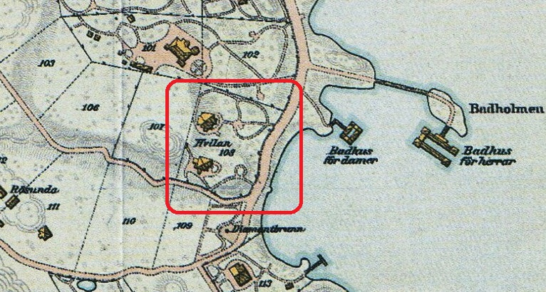 Del av Karta över Saltsjöbaden (Neglingehalvön) visande Villa Hvilan (Kråkslottet och Doktorsvillan)